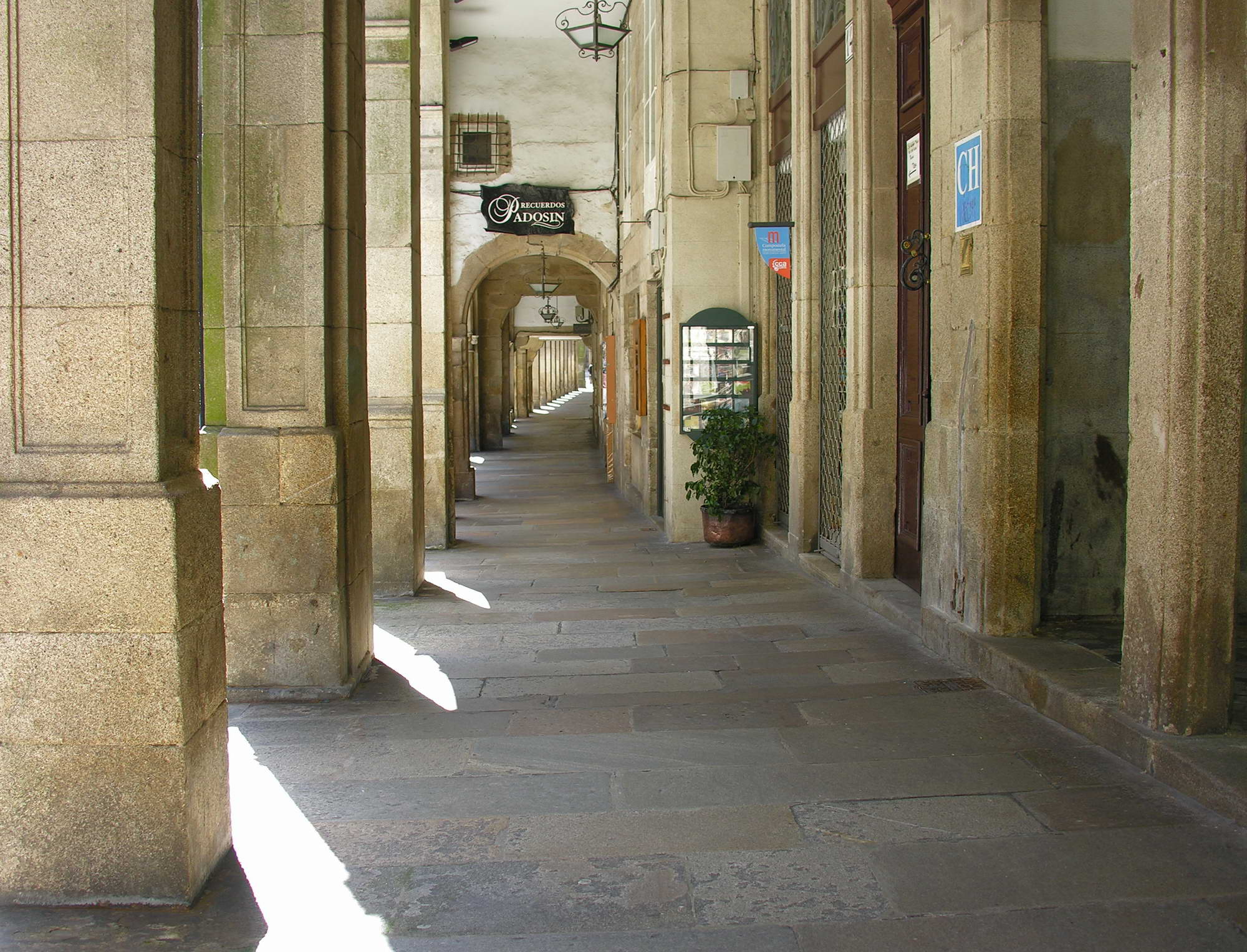 self made. Rúa do Villar Santiago de Compostela, Galicia, Spain.